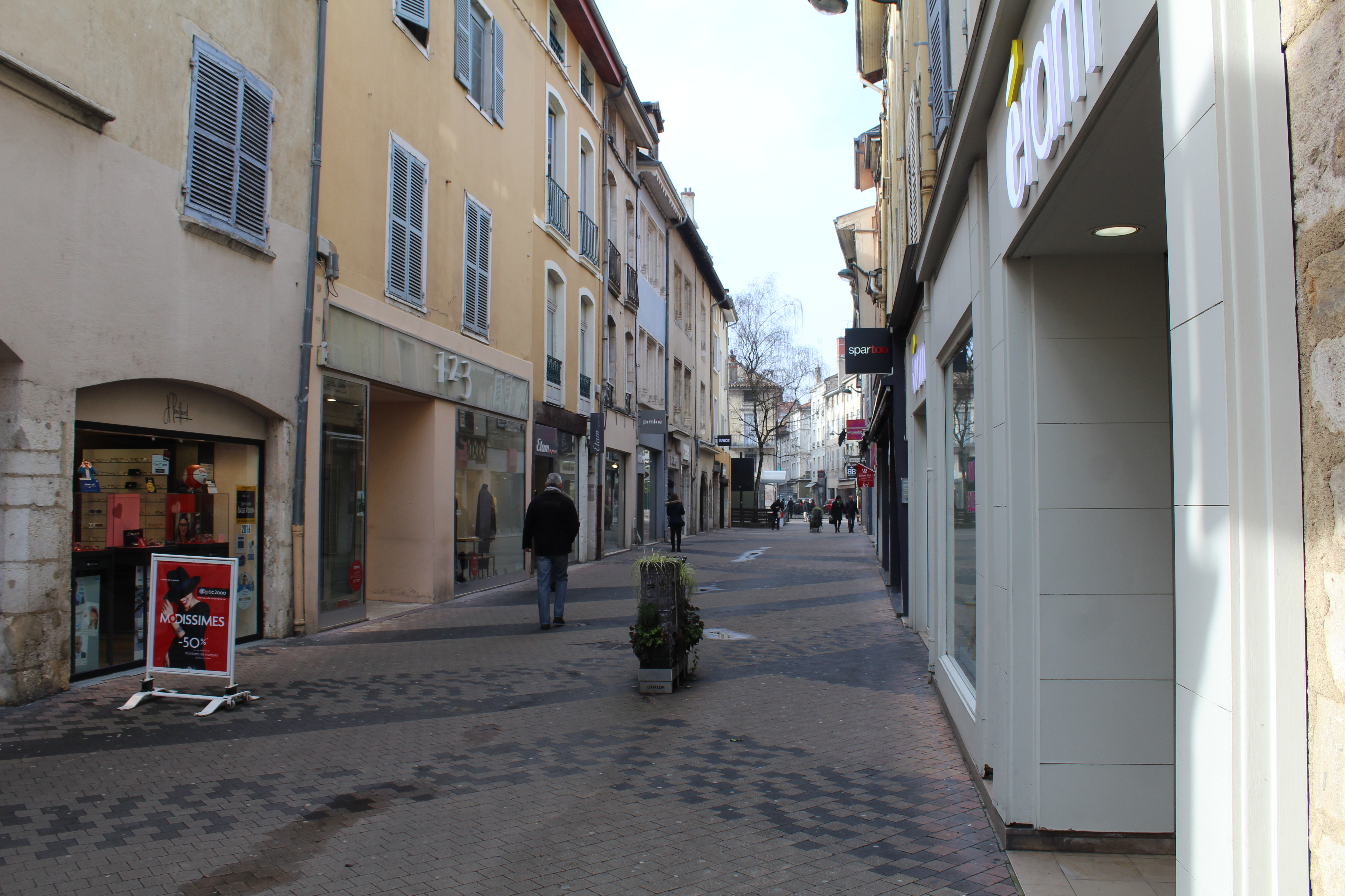 Rue Maréchal-Foch à Bourg-en-Bresse.